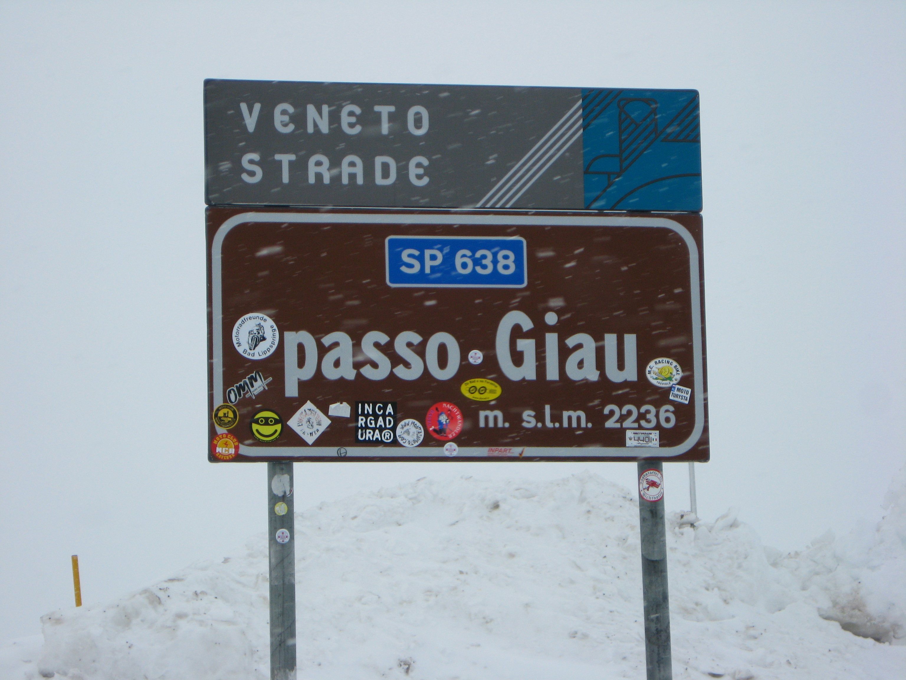 Passo Giau/Giaupass